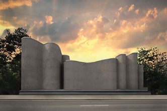 Das MAC Museum Art & Cars bei Dämmerung